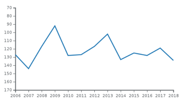 FIFA Ranking der libanesischen Fußballnationalmannschaft der Frauen von 2006 bis heute.